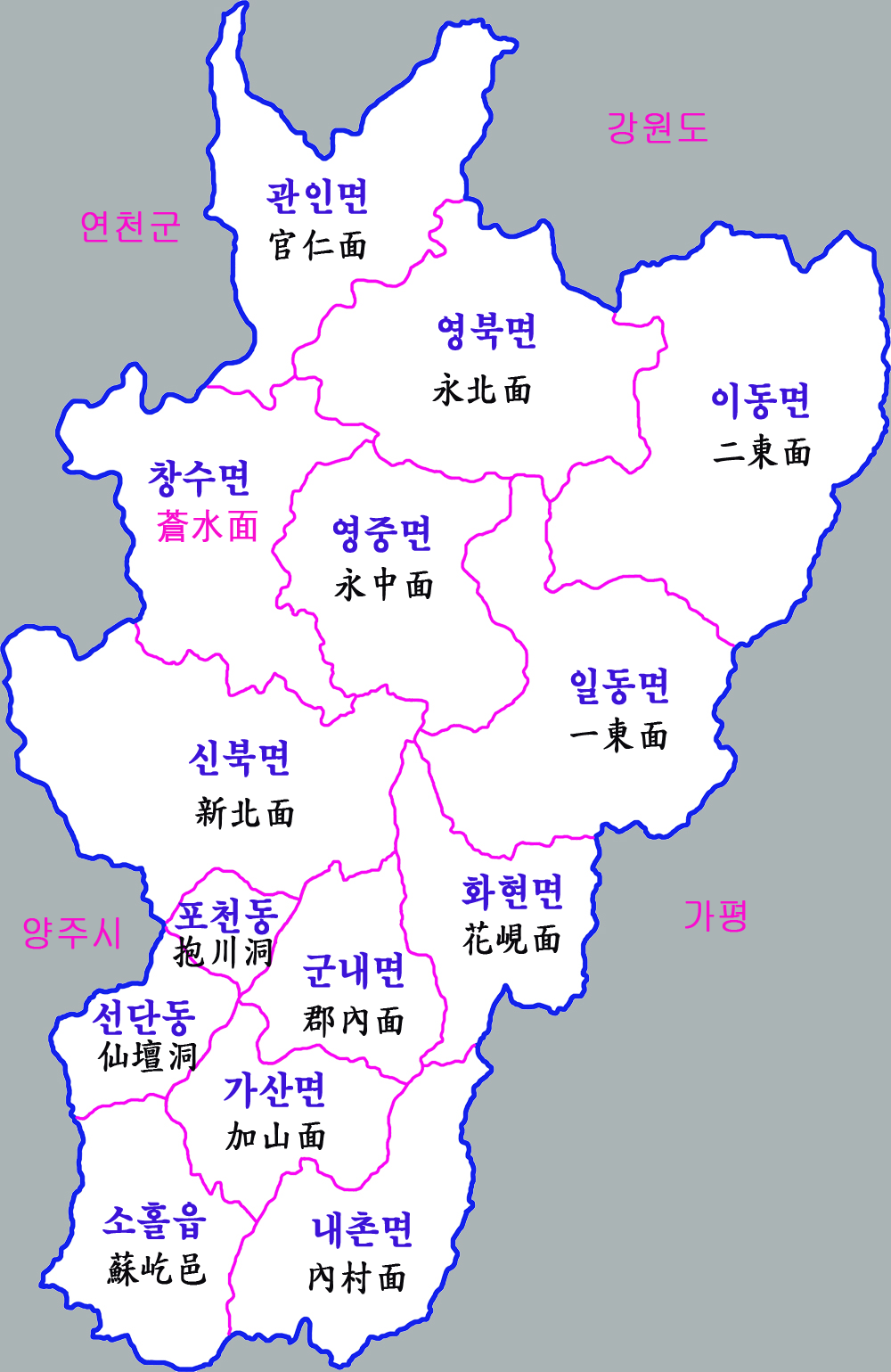 경기도 포천시 행정구역도